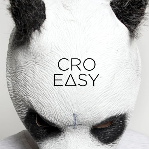 Cover der Single „Easy“